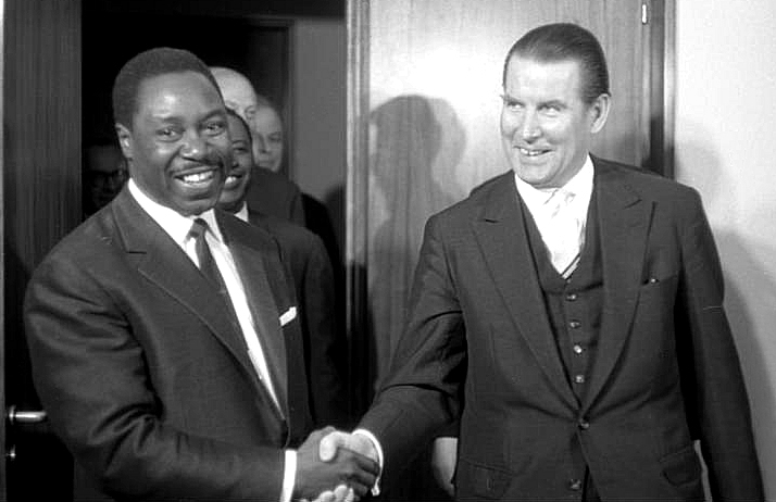 BM Schröder empfängt den Außenminister von Guinea, Beavogui Lansona